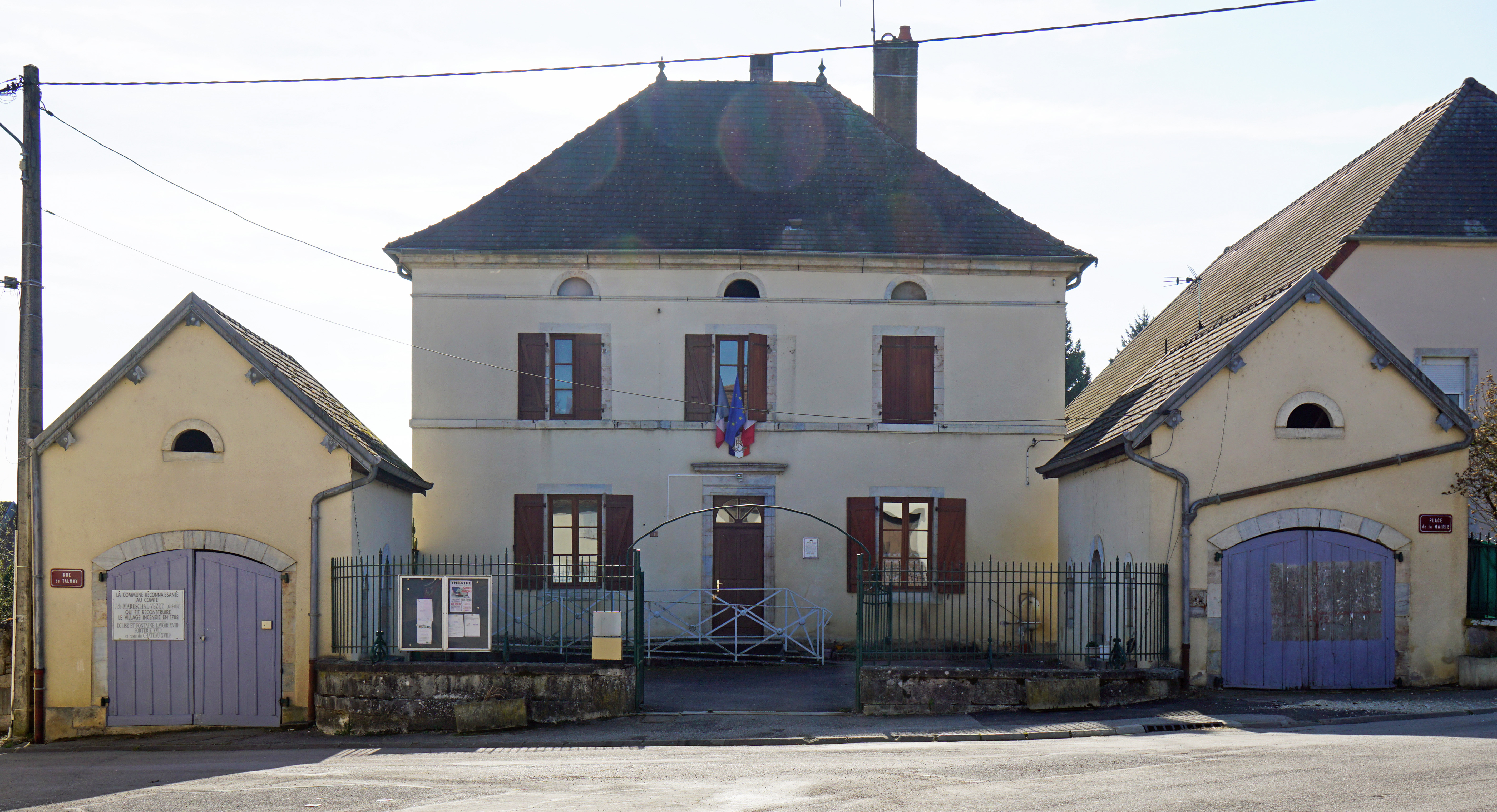 Vezet.